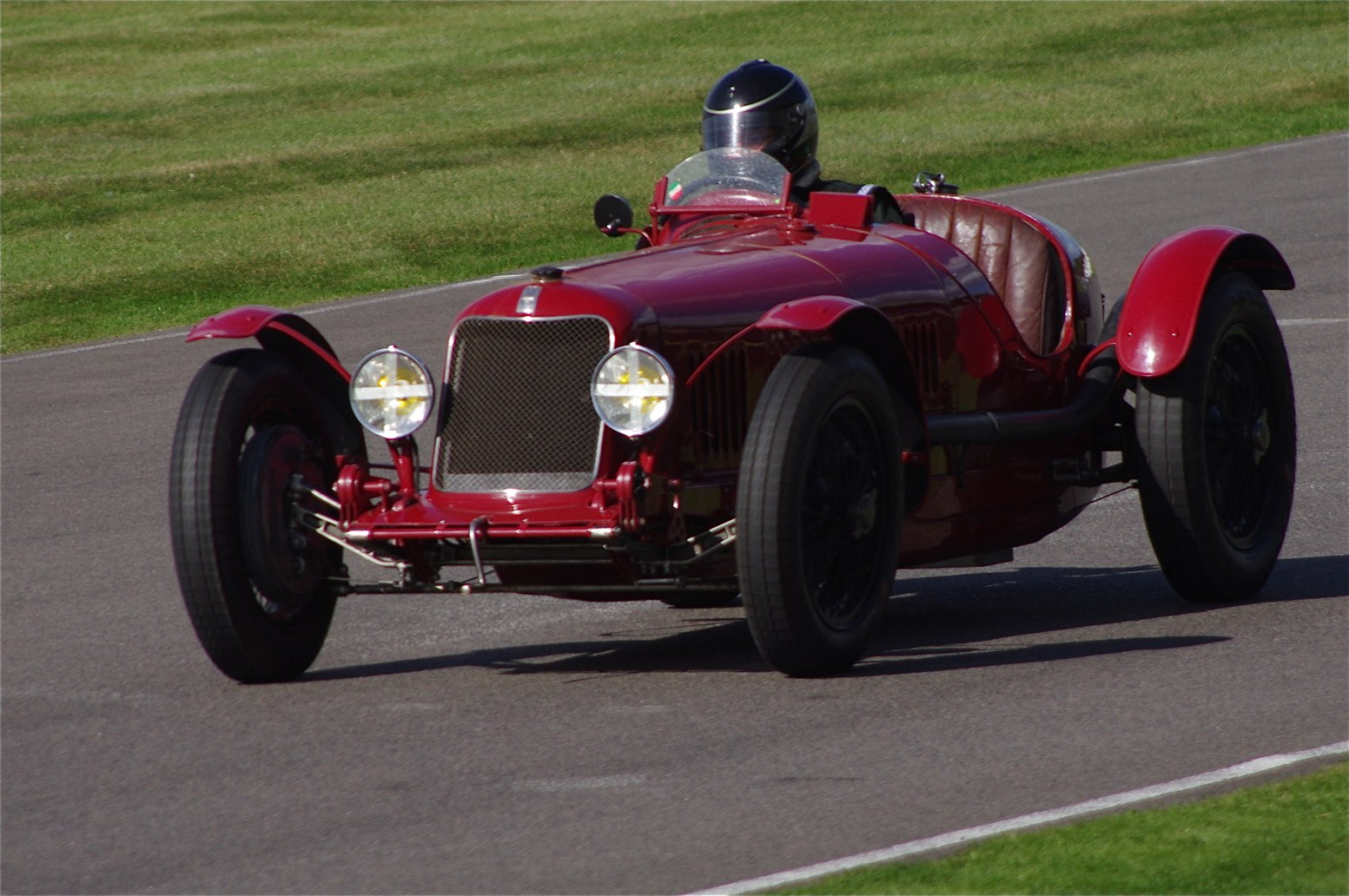 Goodwood Revival 2012